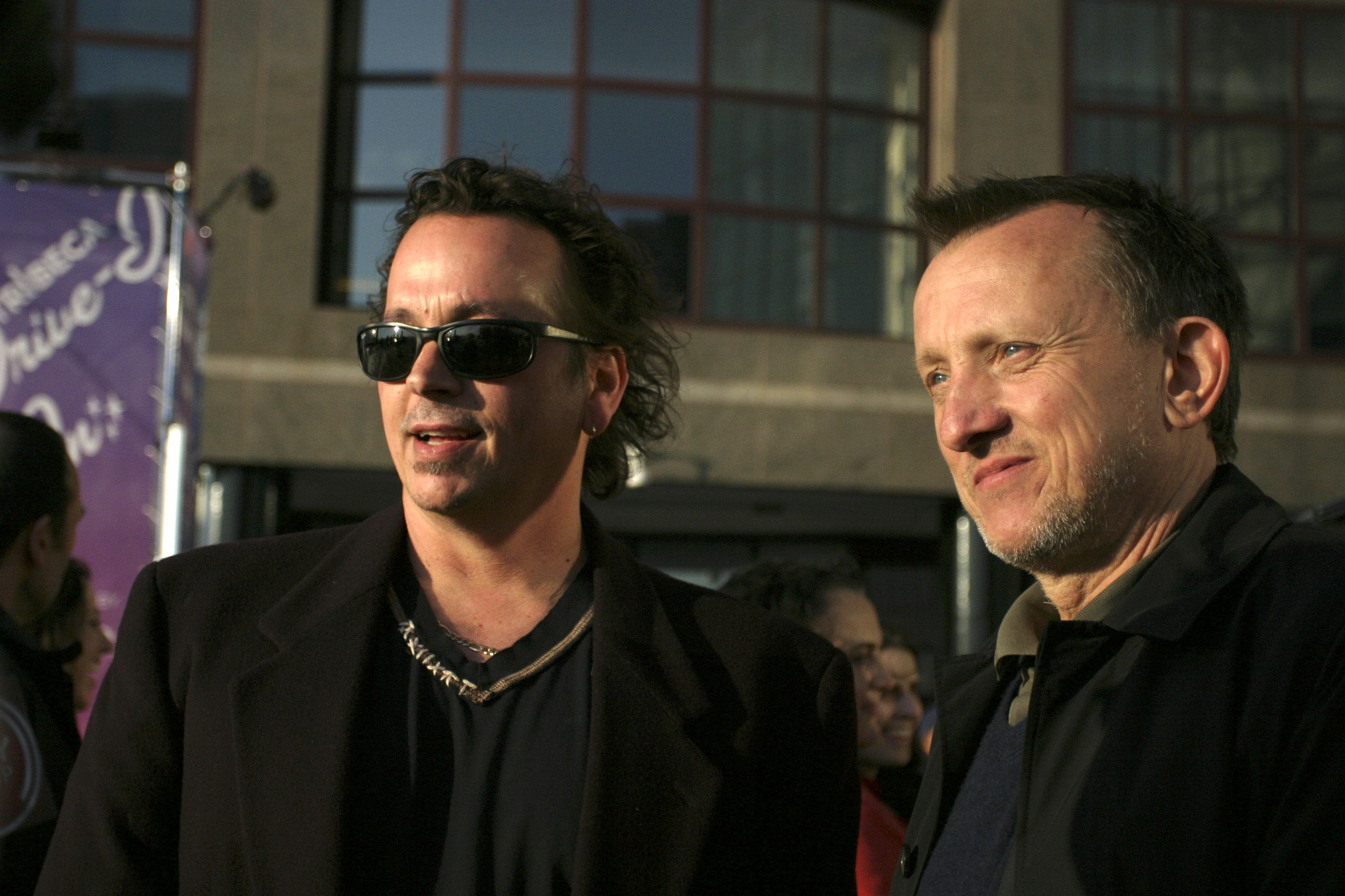 © Rubenstein, photographer Martyna Borkowski